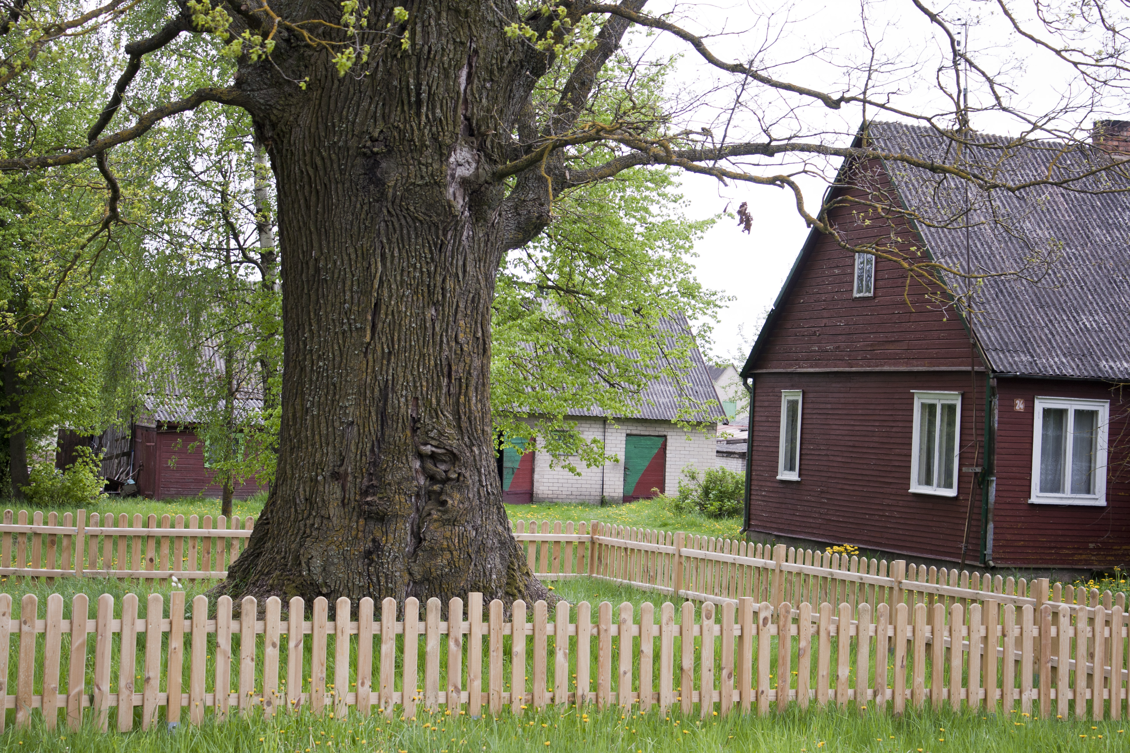 Rozalimas oak